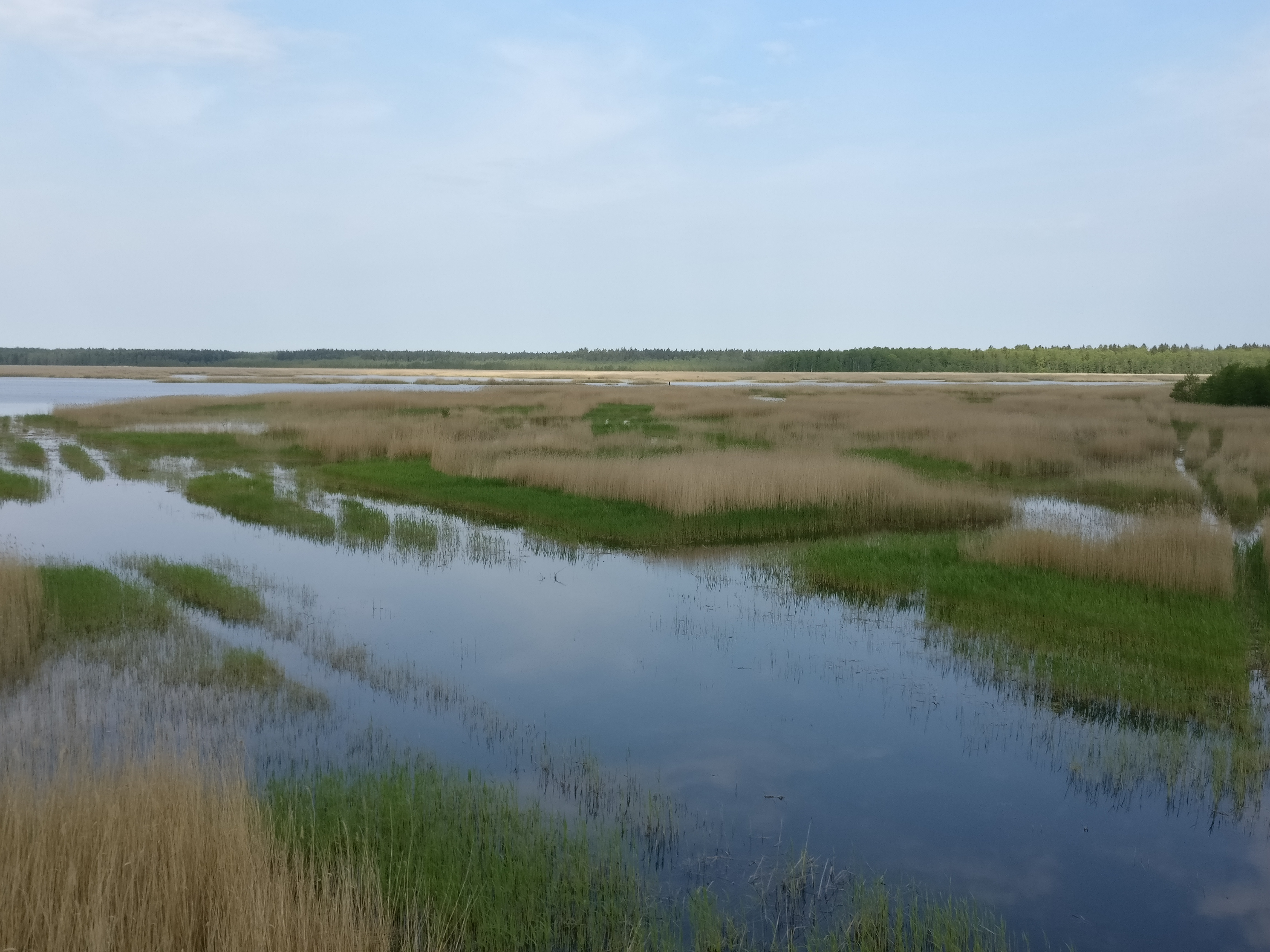 Kaņieris, Ķemeru nacionālais parks